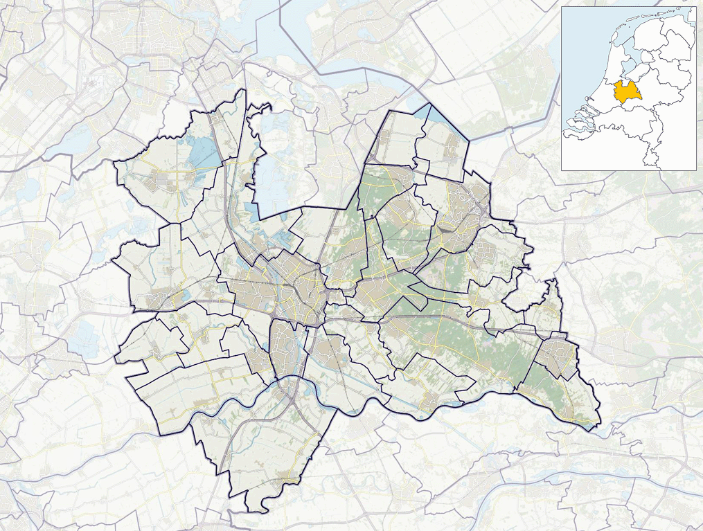 Positiekaartje van de provincie, variant "gemeentelabels"